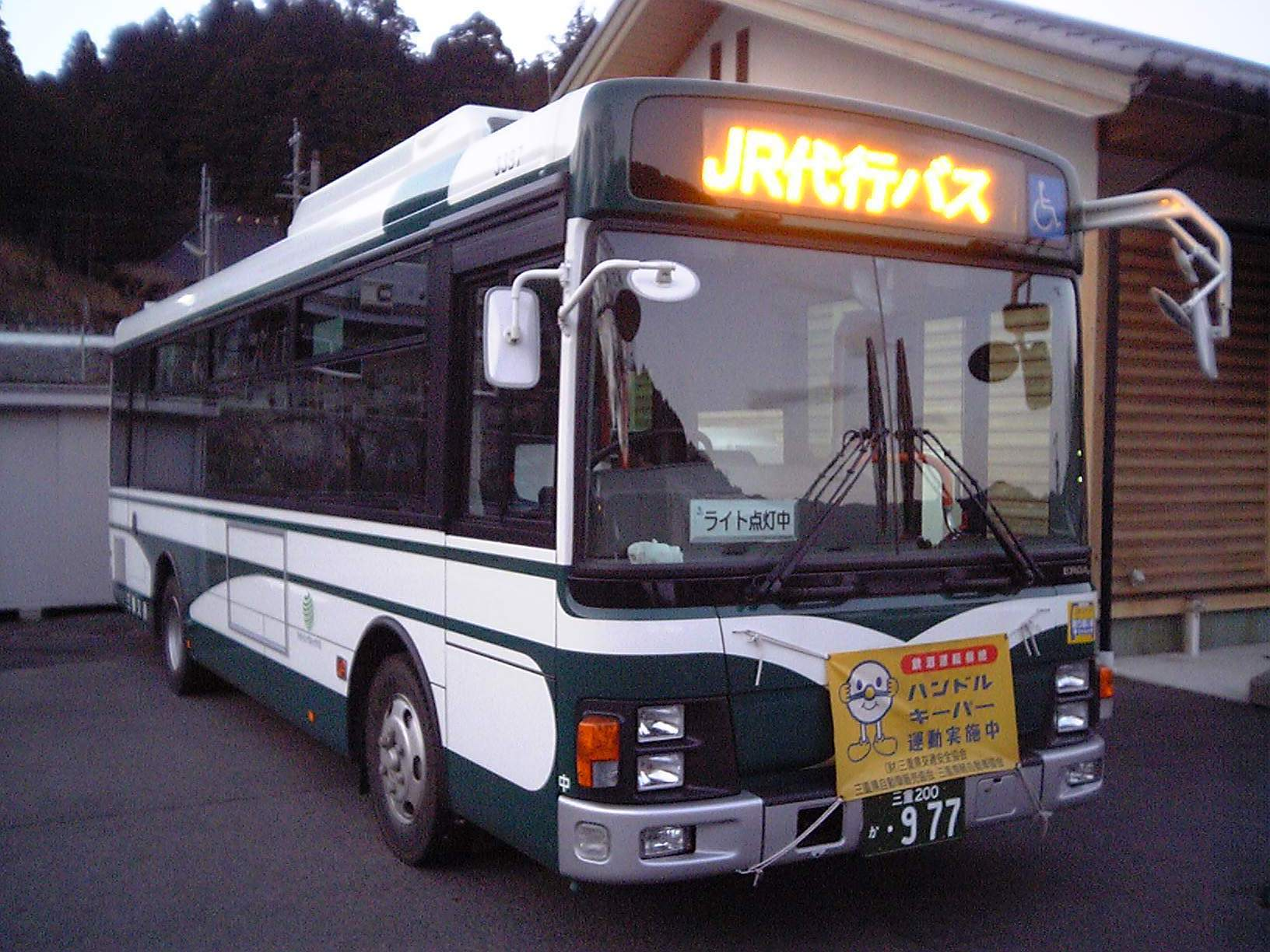 名松線代行バス（伊勢奥津駅）